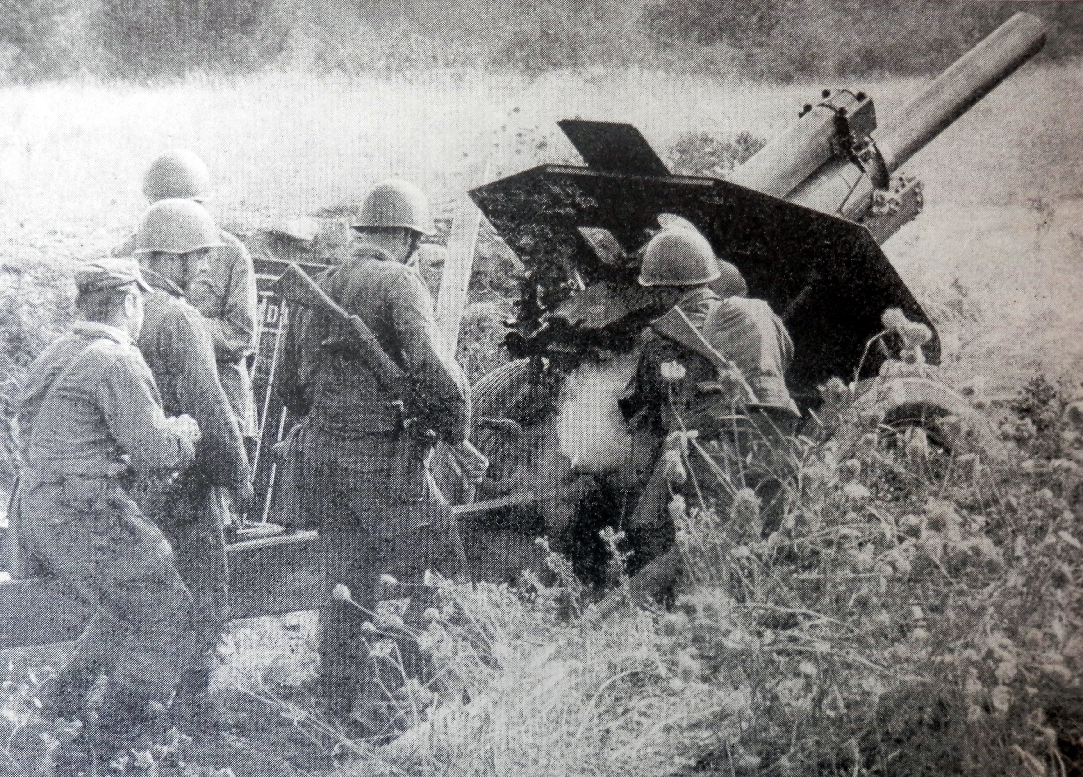 Obrázok z roku 1971, september. Vojaci základnej služby ČSĽA, z delostreleckého oddielu 79. motostreleckého pluku Benešov pri Prahe. Účasť na bojových ostrých streľbách vo VVP Boletice, Šumava. Československo.